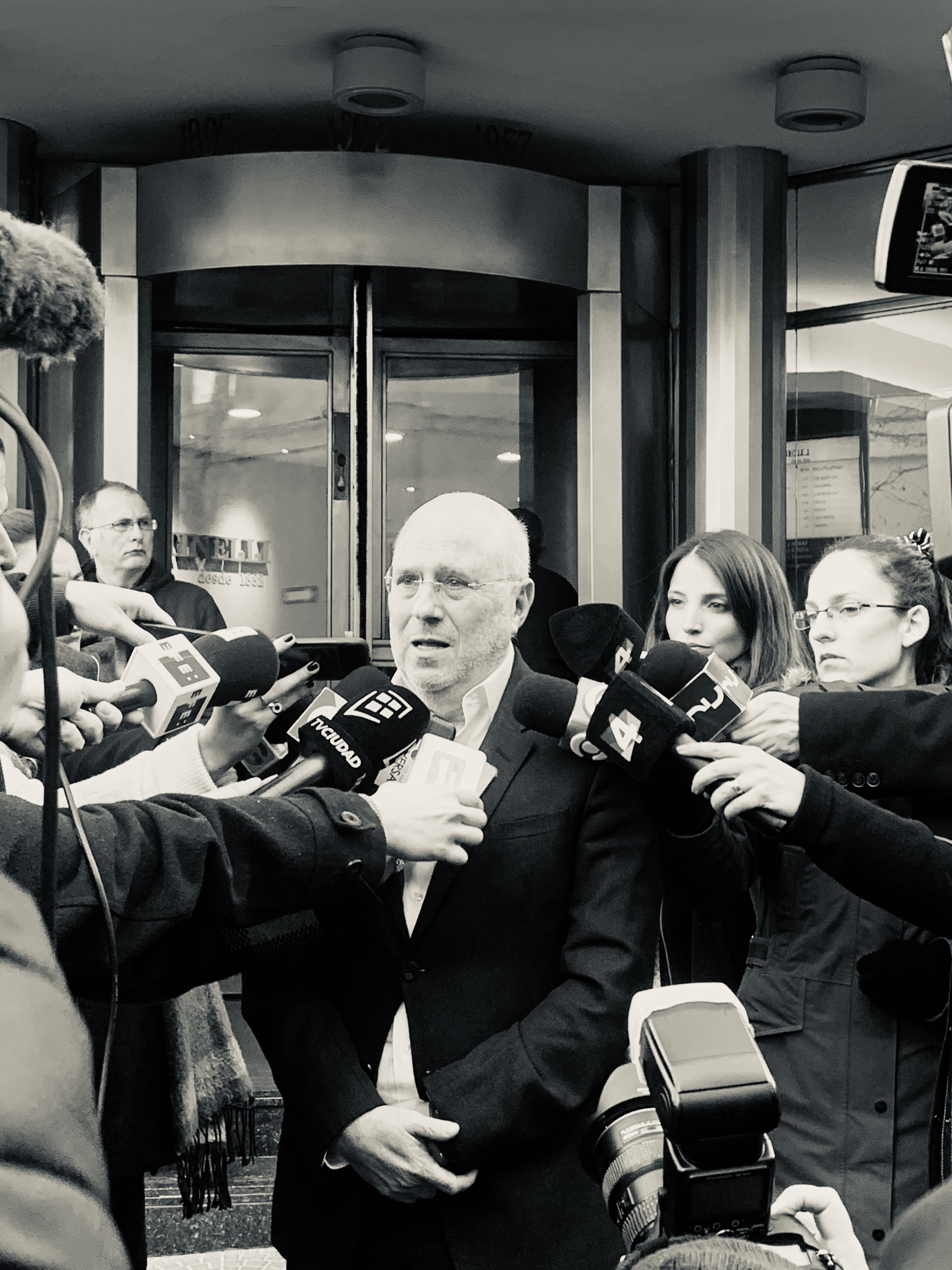 Edgardo Novick, en conferencia de prensa durante el velatorio de María Auxiliadora Delgado en julio de 2019.